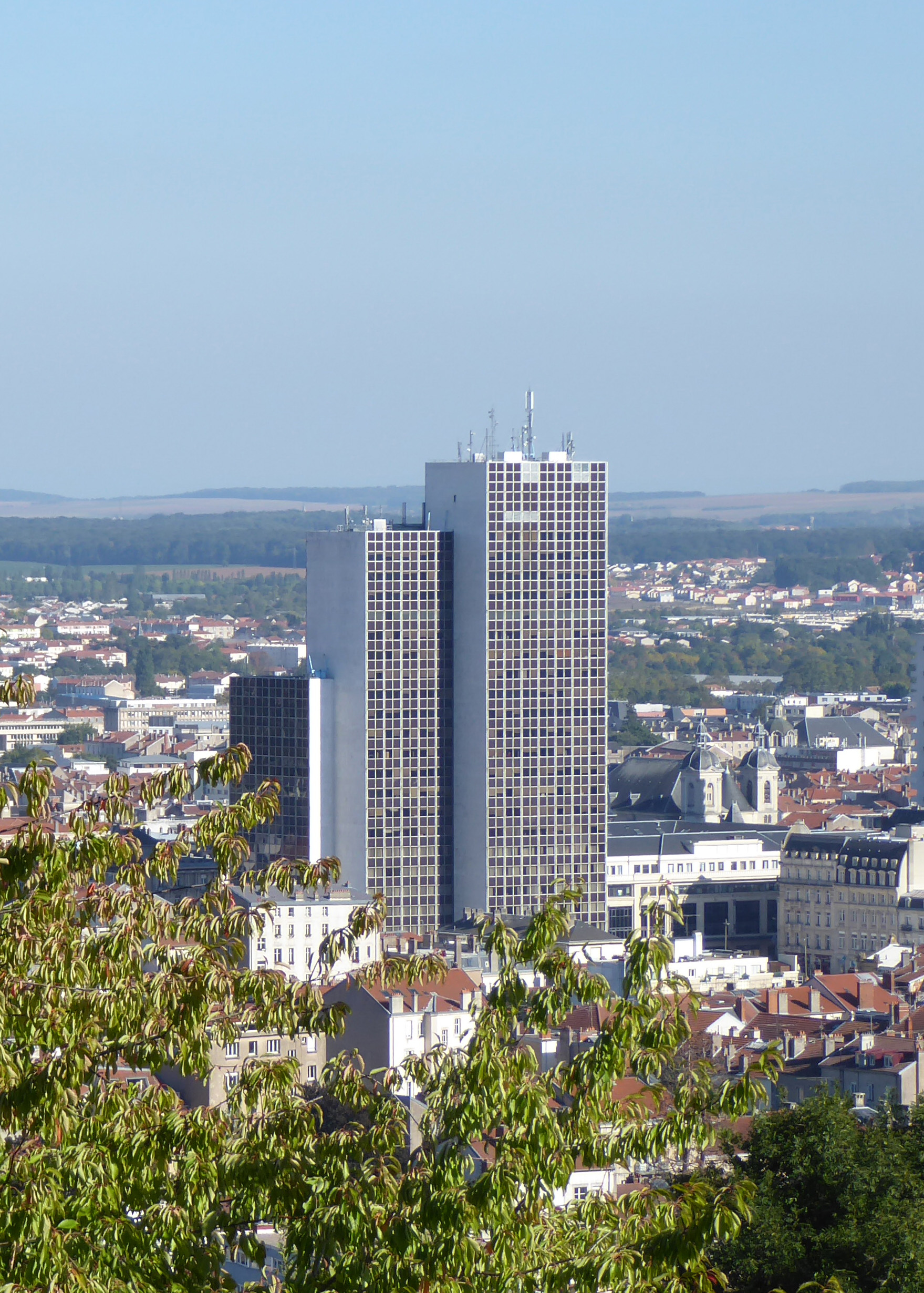 La tour Thiers à Nancy vue depuis le parc de la Cure d'Air Saint-Antoine en 2015.